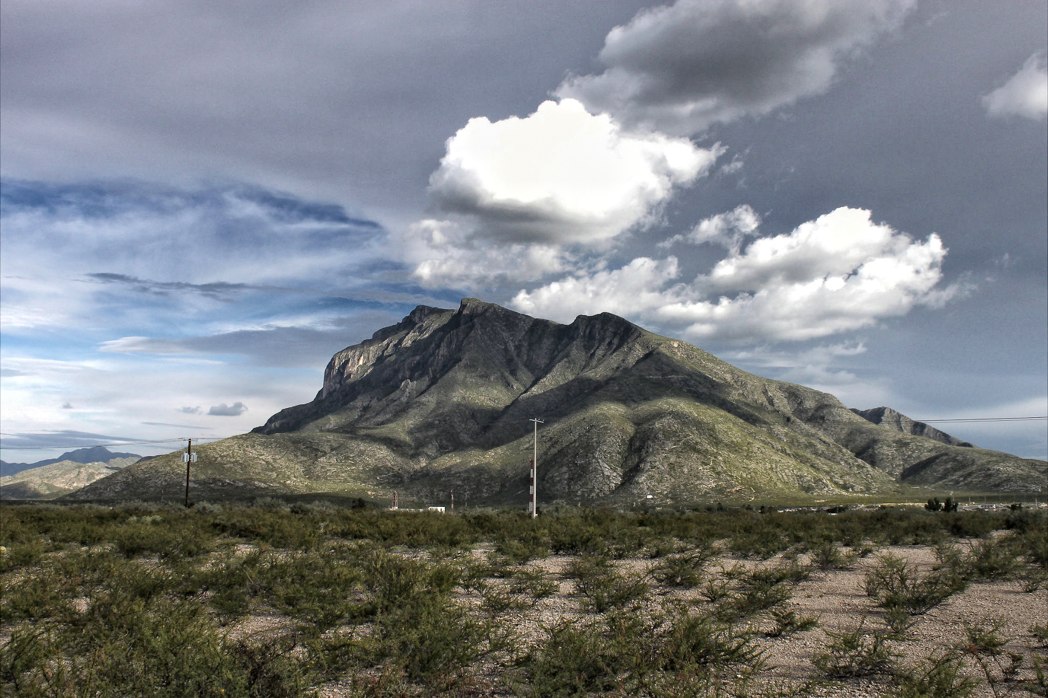 Sierra que asemeja la cara de una mujer.